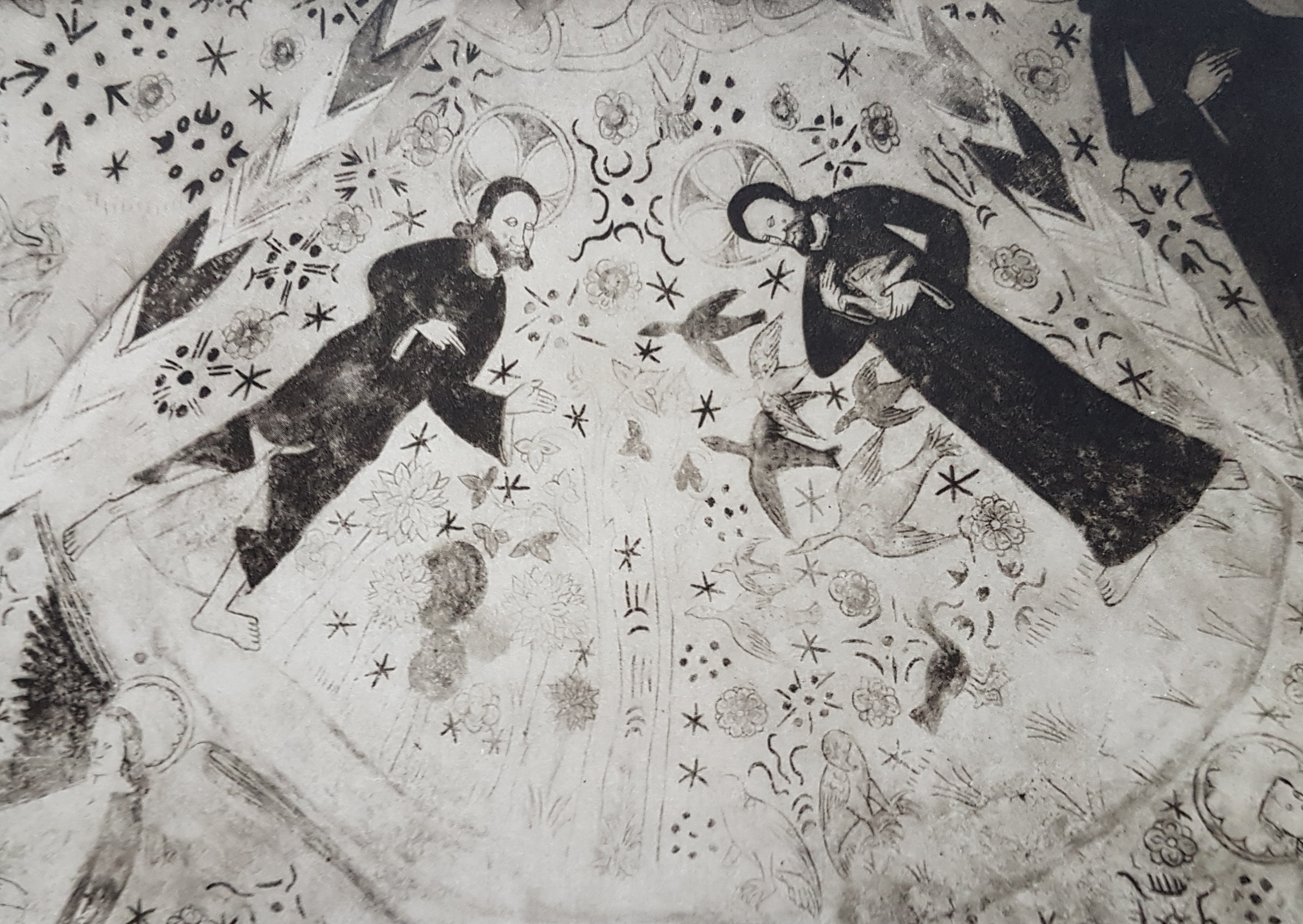 Valvmålning i Linderöds kyrka utförd av Andreas Johannis, avfotograferad bild från Allhems Svenskt konstnärslexikon.